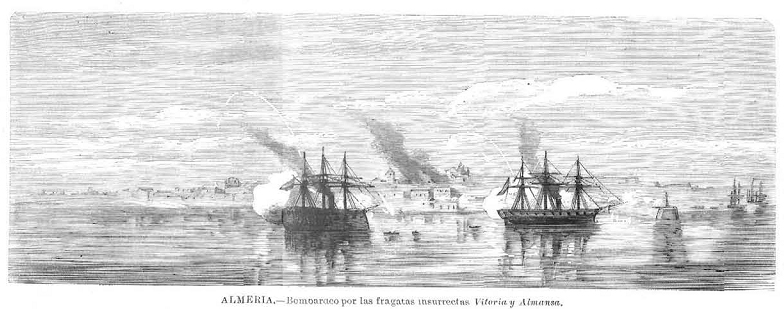 Bombardeo por las fragatas insurrectas Vitoria y Almansa, Almería, en la revista La Ilustración Española y Americana.